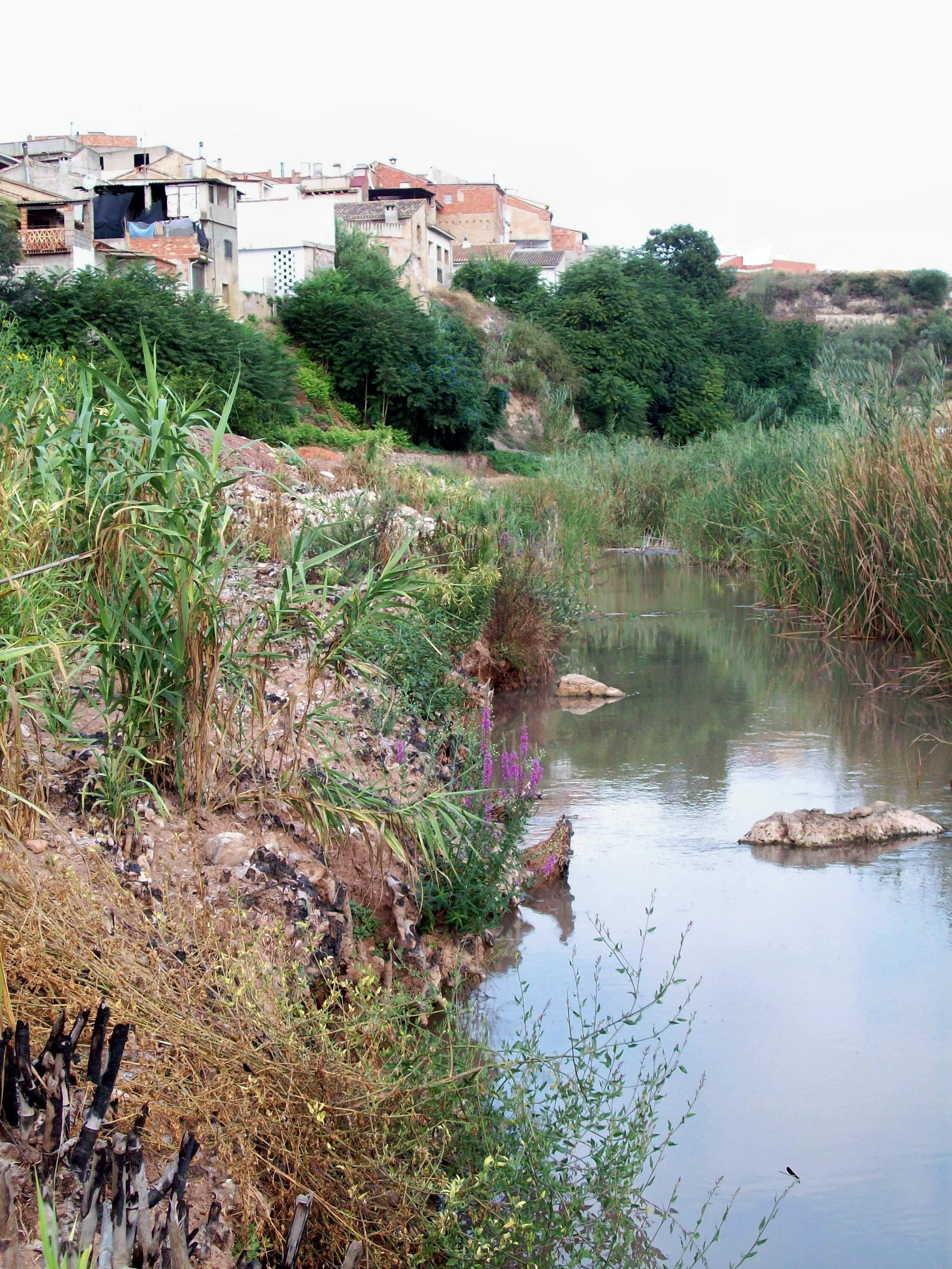 Rio Sellent, a su paso por el pueblo del mismo nombre